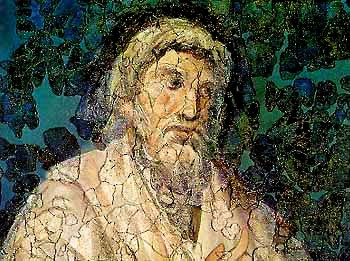 Probabile ritratto di Lucio Cecilio Firmiano Lattanzio. Pittura murale del secolo IV.